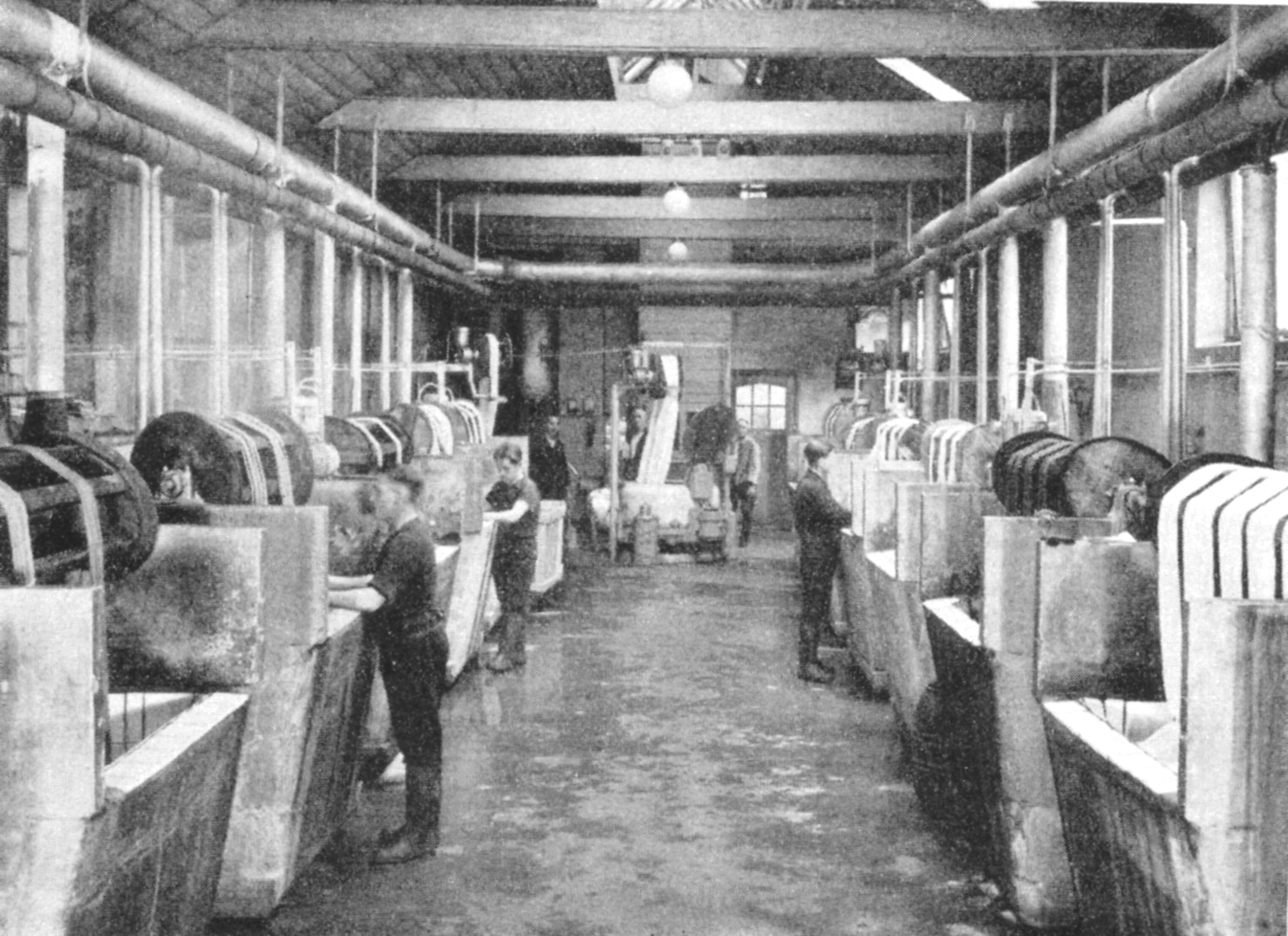 historische Innenansicht um 1950 der Ausrüstung im Zentrum der von 1930-1937renovierten Textilfabrik von Hasana - J.Hakenmüller in Albstadt-Tailfingen. Foto: Sammlung Metz, Tübingen